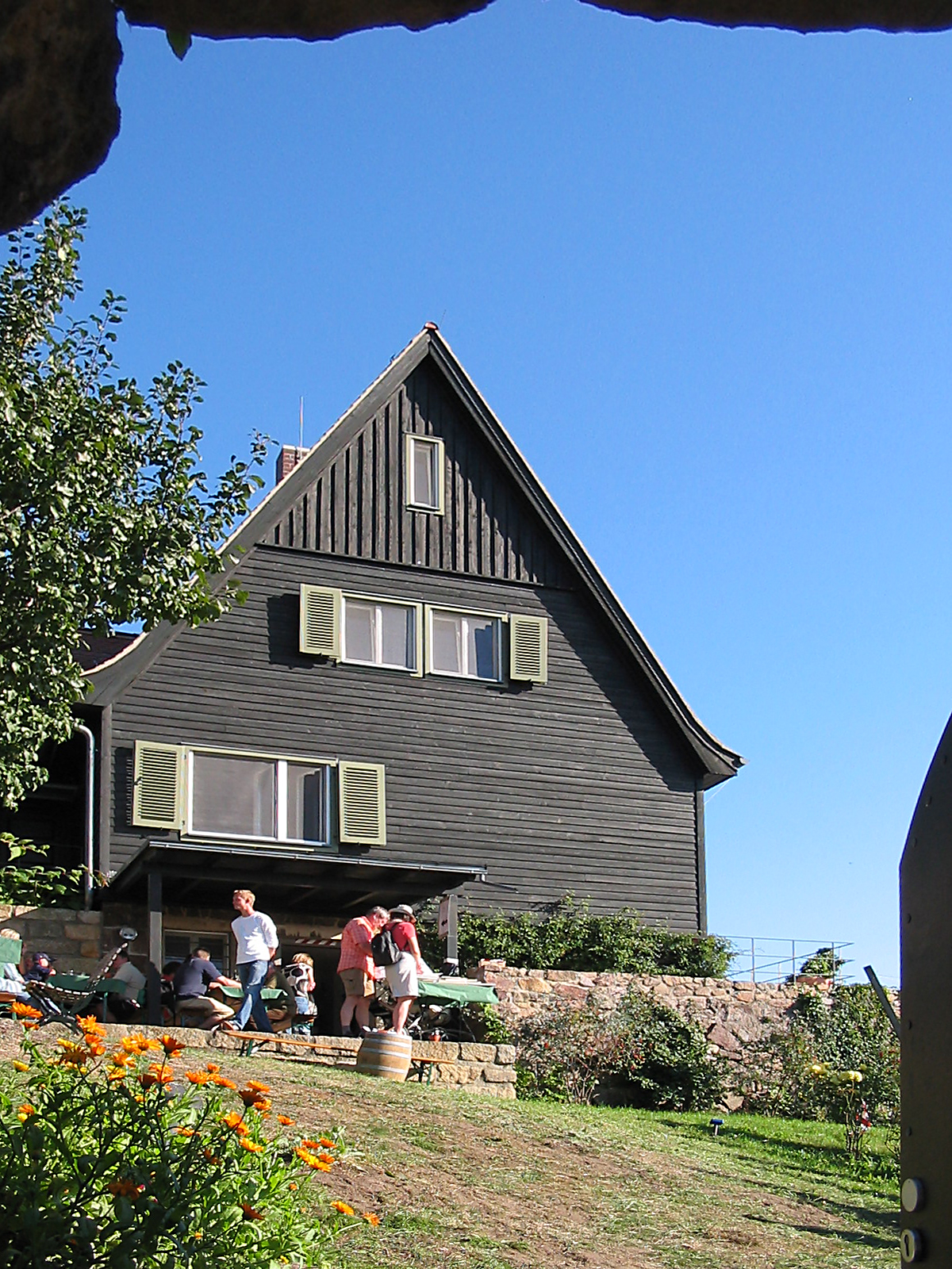 Carl Pfeiffers Wohnhaus am Wächterberg, Weingut Kastler am Tag des offenen Weinguts 2008, Radebeul